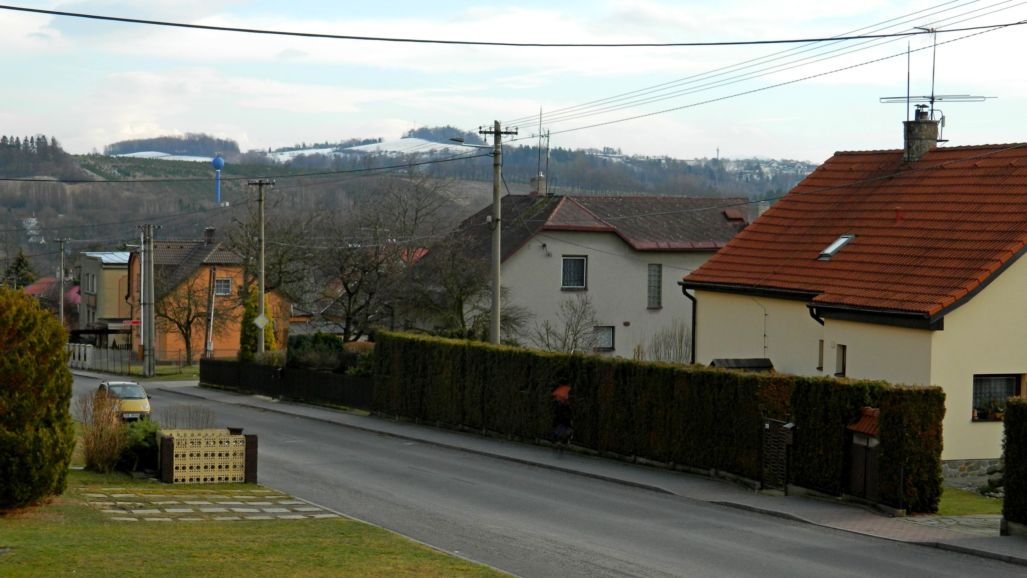 Pohled na Těšínskou pahorkatinu s Babí horou (423 m) z ulice Dlouhé v Těrlicku.